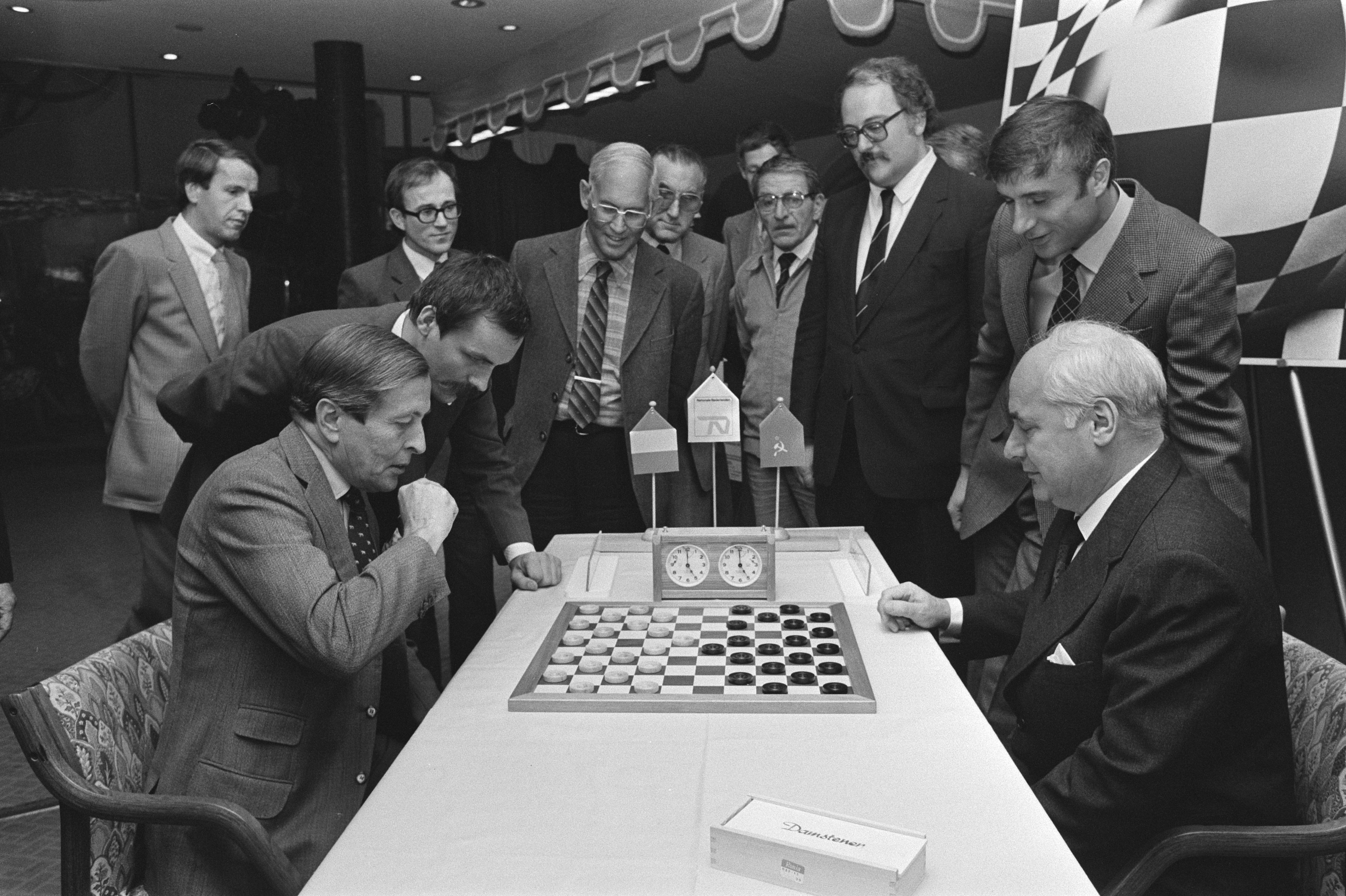 Prins Claus, geassisteerd door Harm Wiersma, damt tegen de Russische ambassadeur Tolstikov, met daarnaast Gantwarg